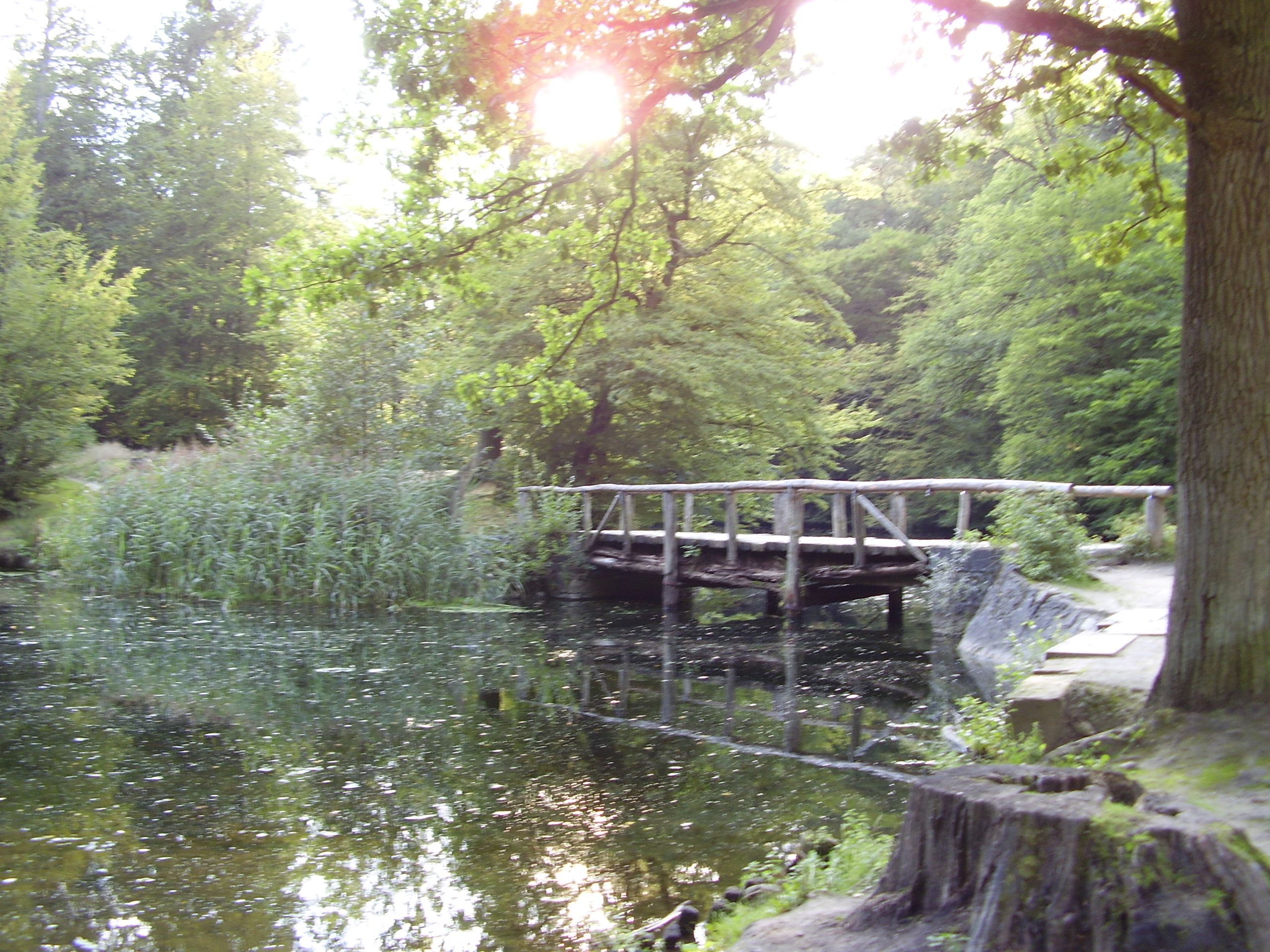 Description: Forêt de Soignes, étangs du Fer à cheval (Bruxelles) Author: User:Ben2 Date of creation: 29 août 2006 Source: Photo personnelle